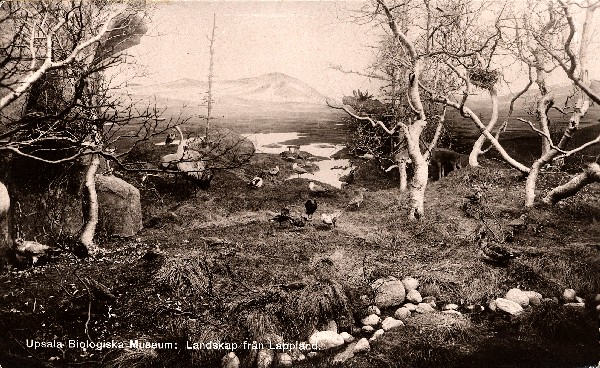 photos, uppsala, sweden